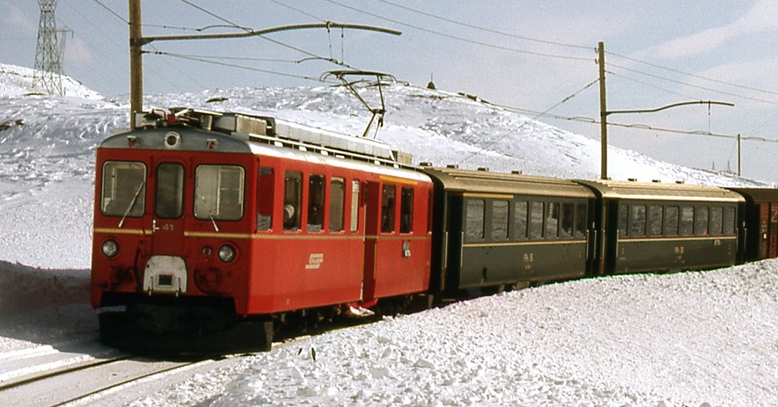 ABe 4/4 II Nr. 41 mit einem gemischten Zug am Berninapass. Der Triebwagen wurde 2010 ausrangiert und verschrottet.